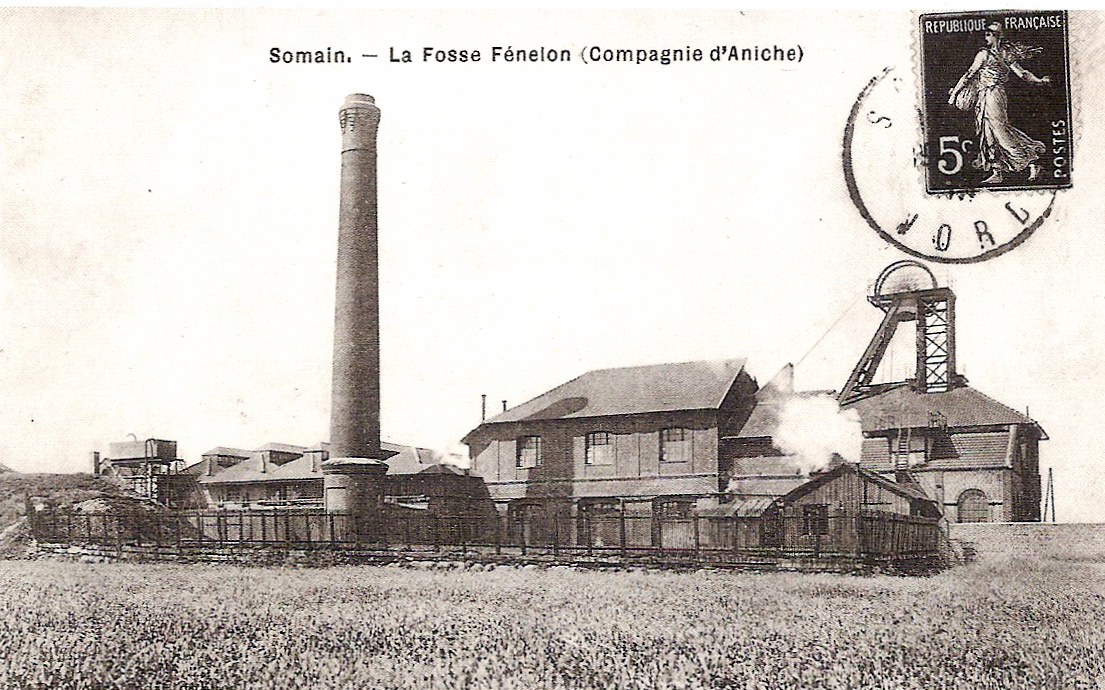 Fosse Fénelon à Aniche de la Cie des mines d'Aniche disparue